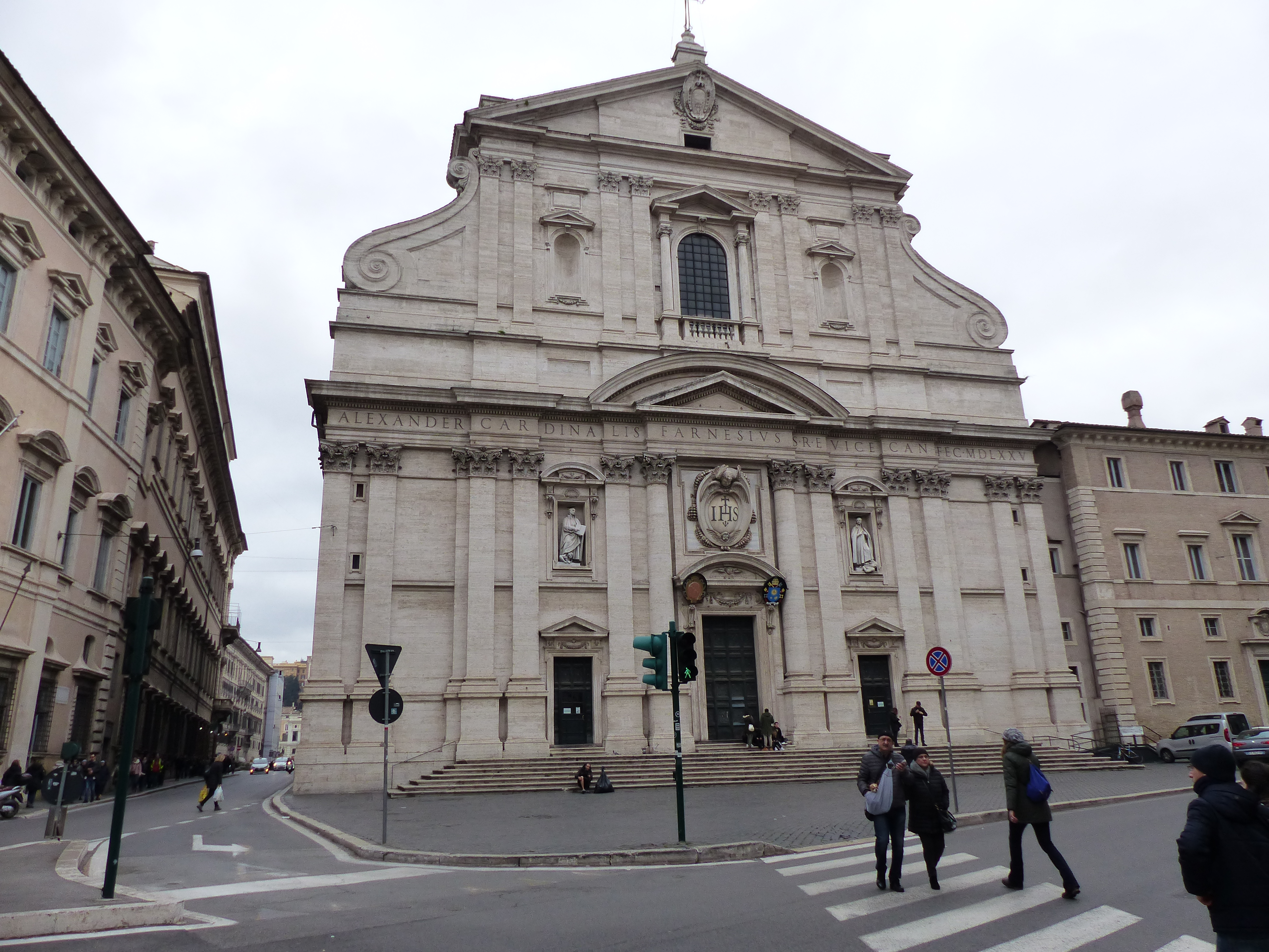 Fachada de Il Gesù, Roma